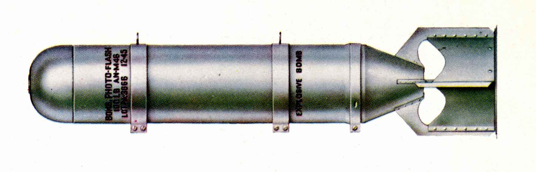 Amerykańska bomba fotograficzna AN-M46